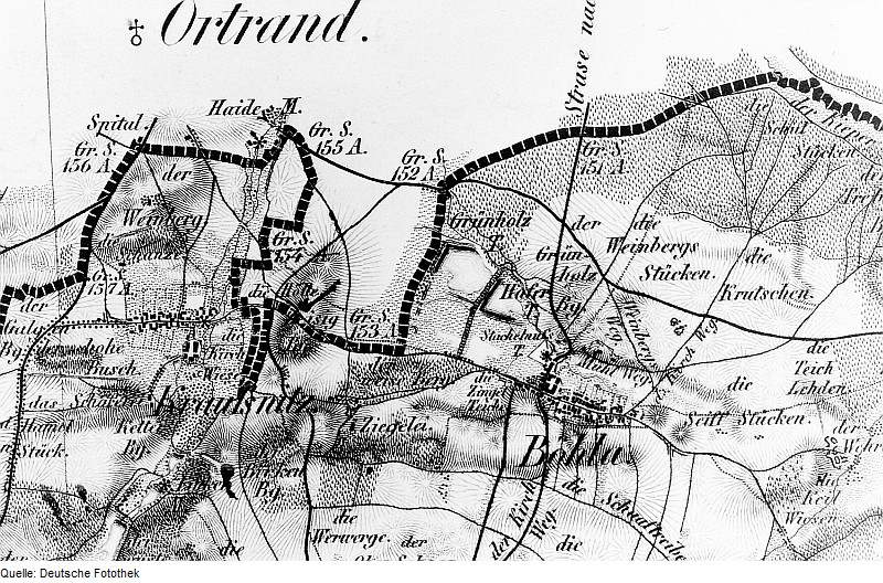 Original image description from the Deutsche Fotothek Schönfeld-Kraußnitz. Oberreit, Sect. Großenhain, 1841/43